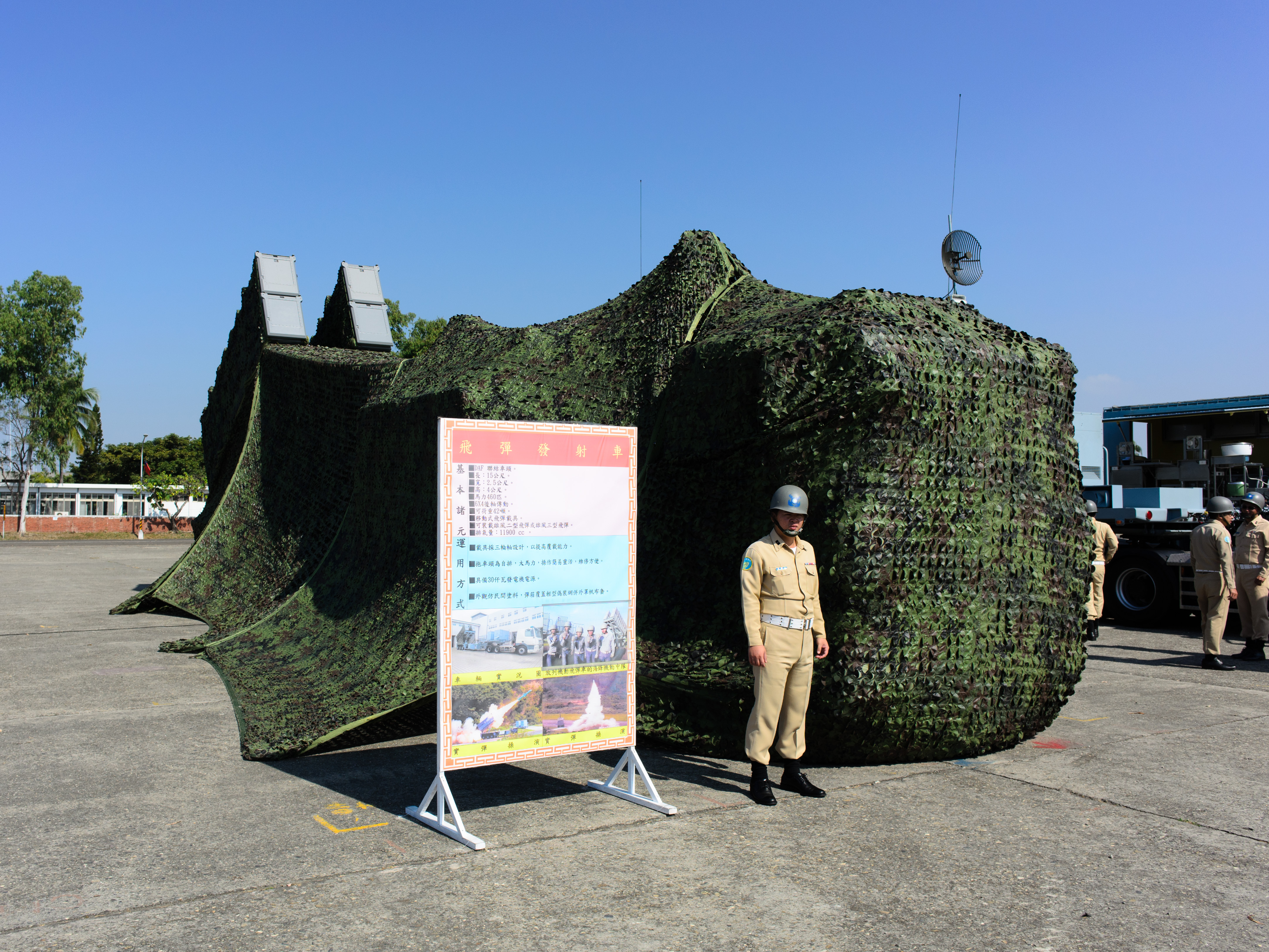 2014年左營軍港營區開放活動上午，艦隊指揮部操場上覆蓋偽裝網的機動雄風二型與三型反艦飛彈發射拖車。